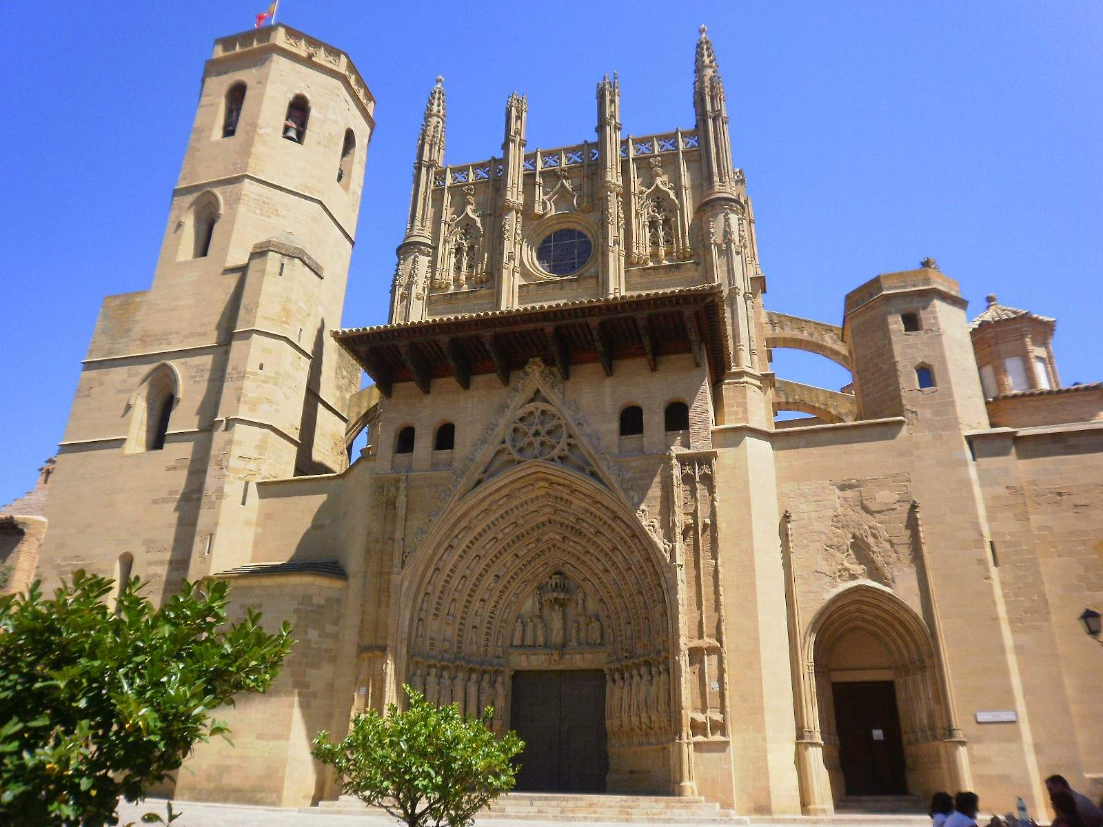 Catedral de Huesca